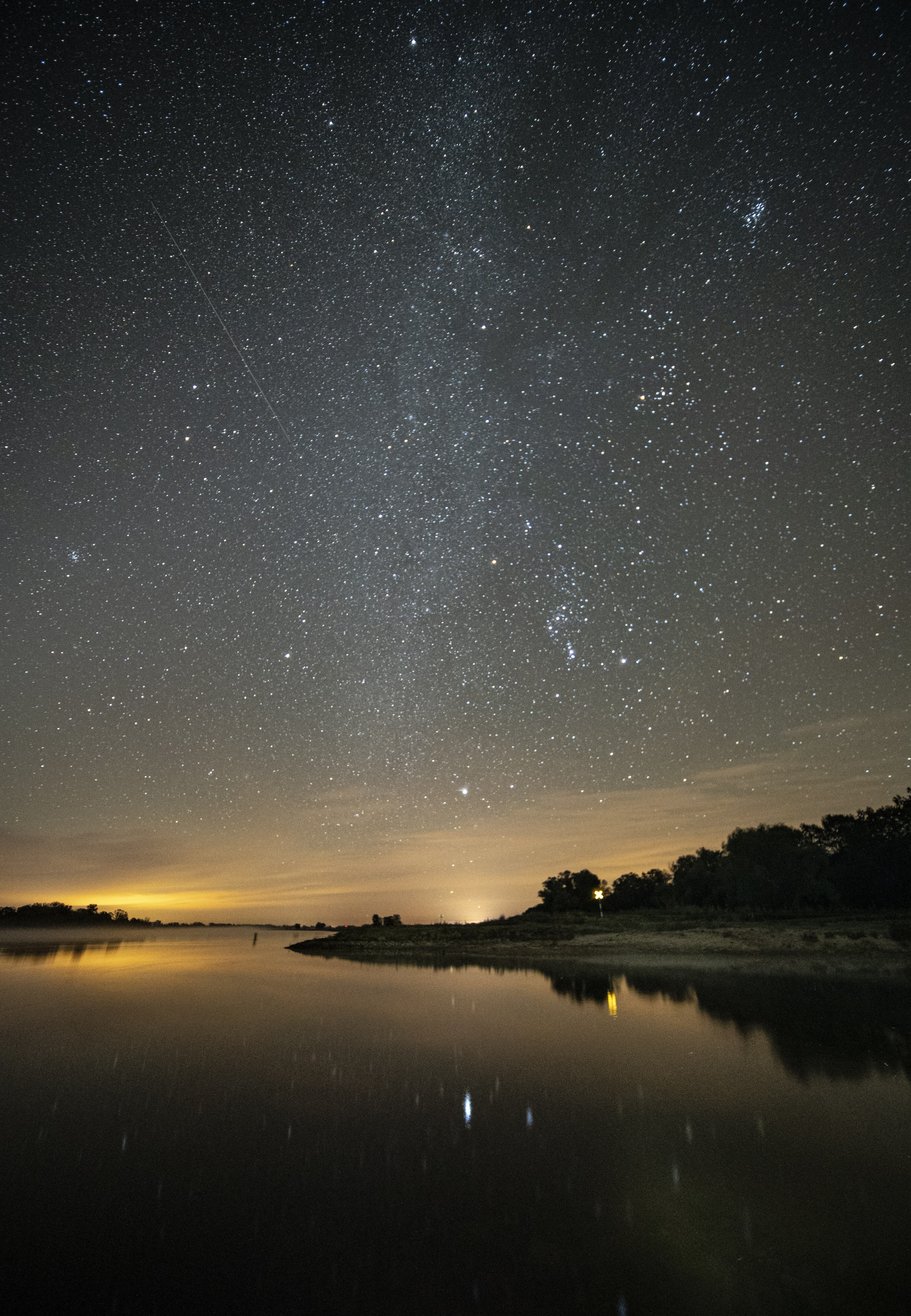 Das Wintersechseck wurde am 07.10.19 um 04:45 Uhr in Besandten / Brandenburg in Himmelsrichtung Ostsüdost aufgenommen. Capella im Fuhrmann (nahezu im Zenit) bildet die Spitze des Sechsecks. Im Sechseck im Uhrzeigersinn folgt Aldebaran im Stier, Rigel im Orion, Sirius im Großen Hund, Prokyon im Kleinen Hund und Pollux in den Zwillingen. Im Wasser spiegelt sich Sirius. Technische Daten: Sony A7III, 12mm (Laowa) mit 120° Bildwinkel, Blende: 2,8, 30 Sekunden, ISO: 6400